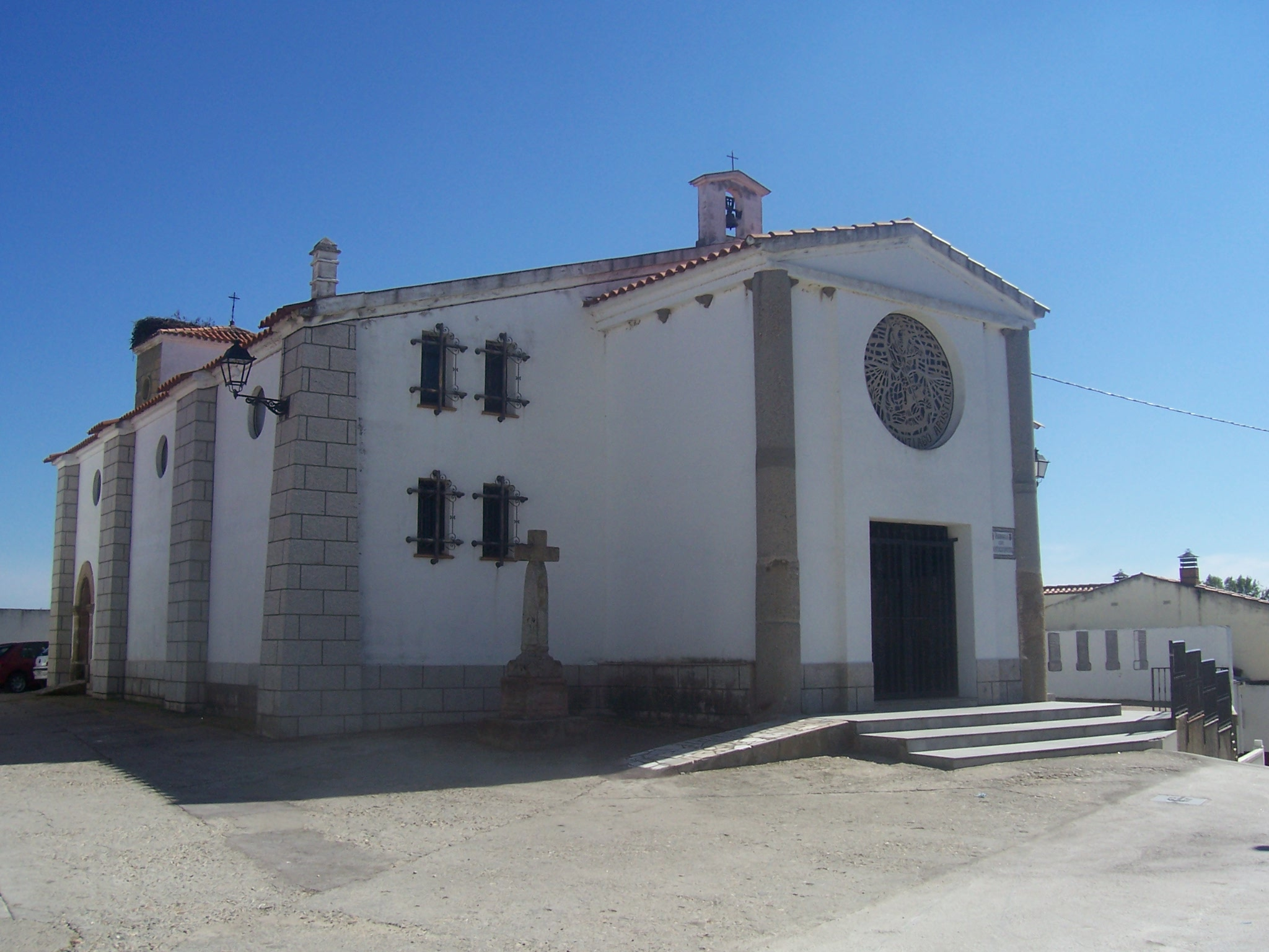 Iglesia Parroquial de Santiago Apóstol, en Carcaboso, Cáceres, España (2007)